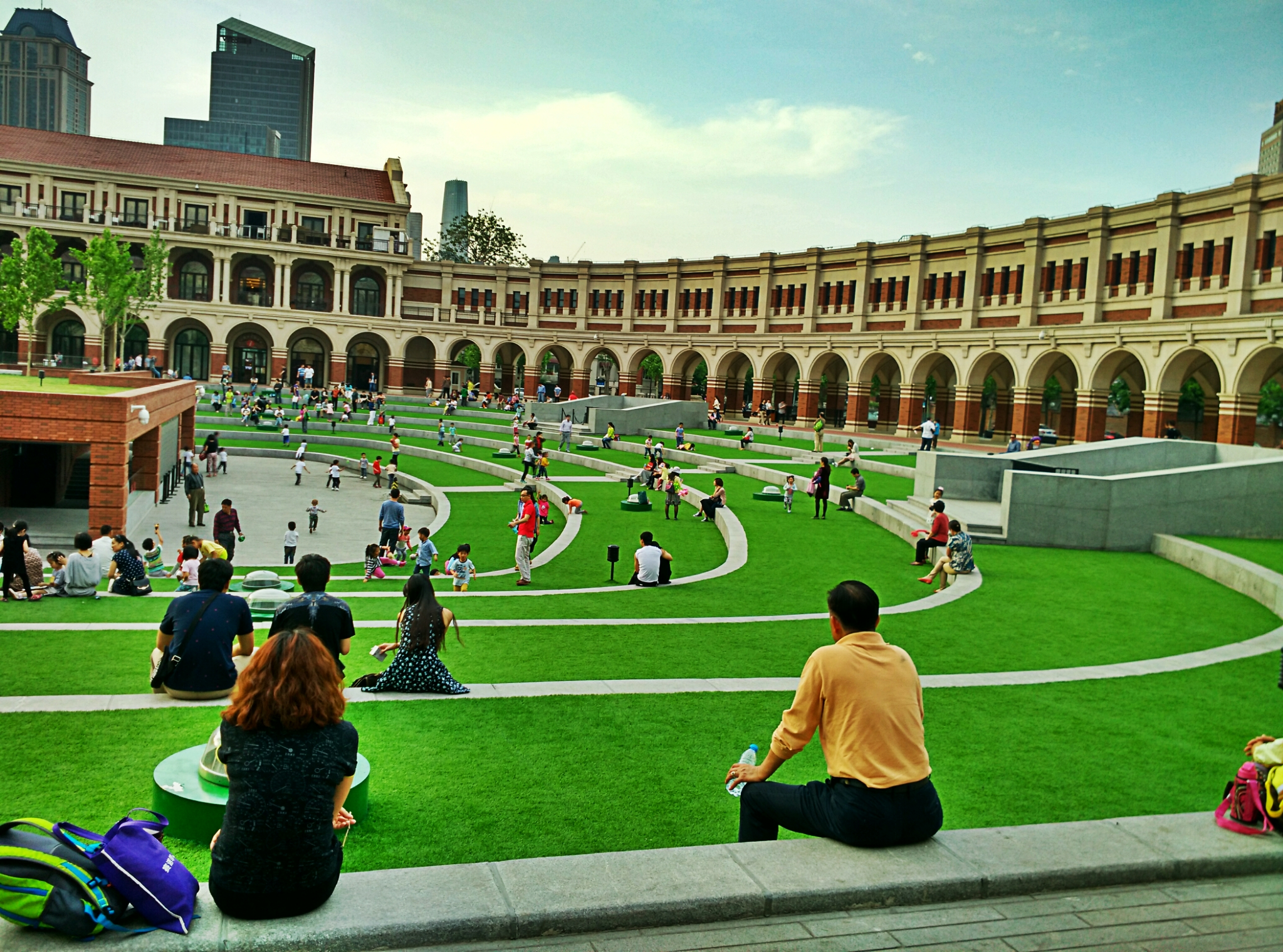 民园广场2015年05月13日